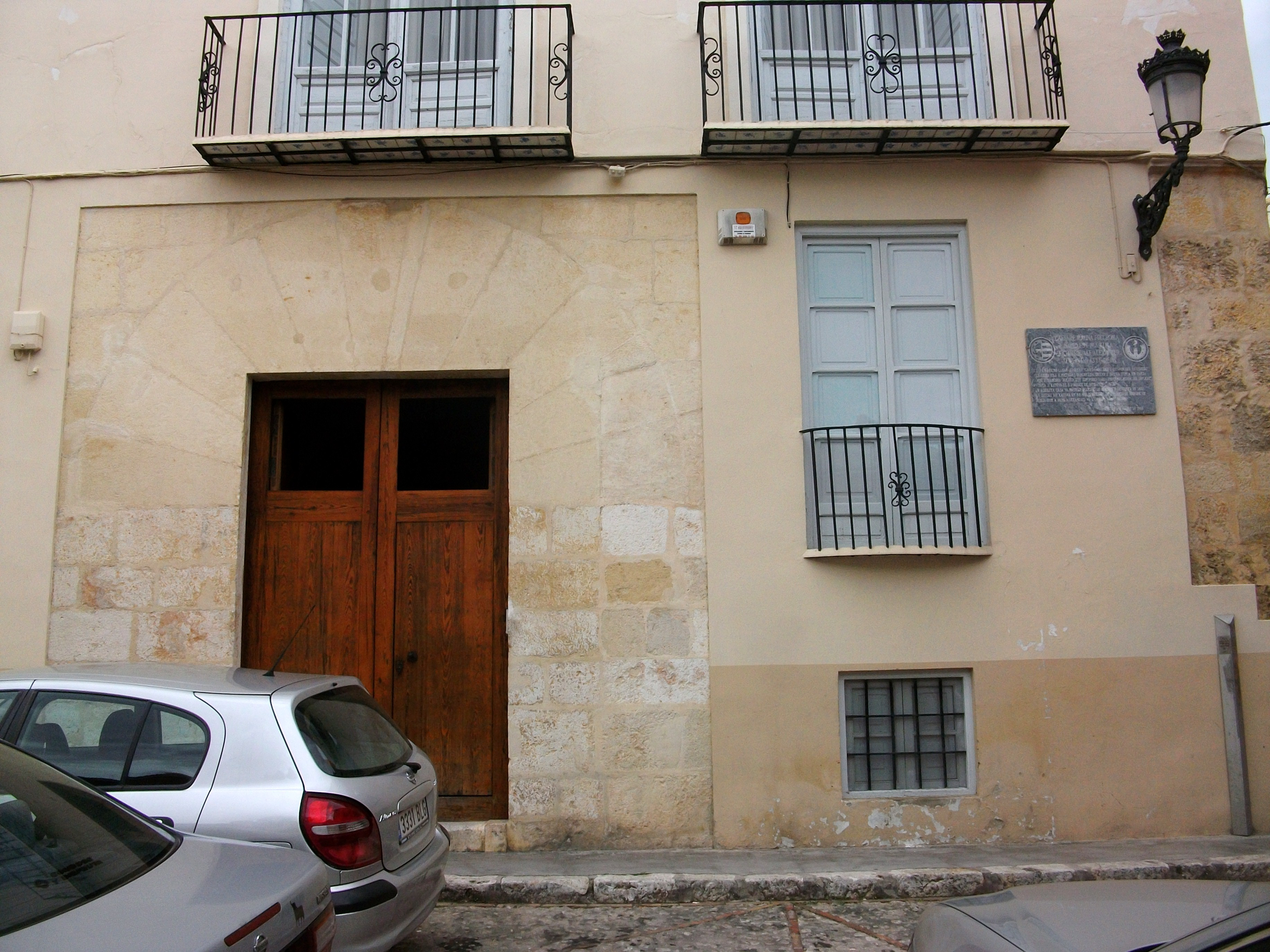 Casa natal d'Alexandre VI, Xàtiva.